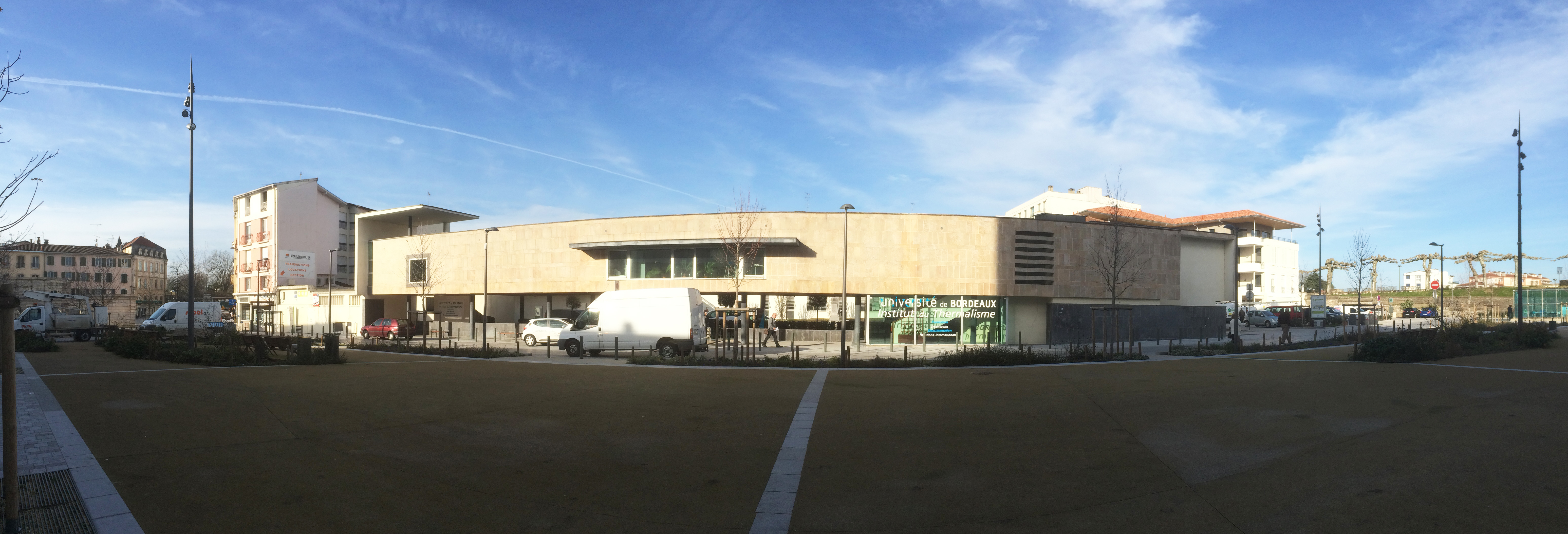 Institut Thermalisme, esplanade du Général de Gaulle.